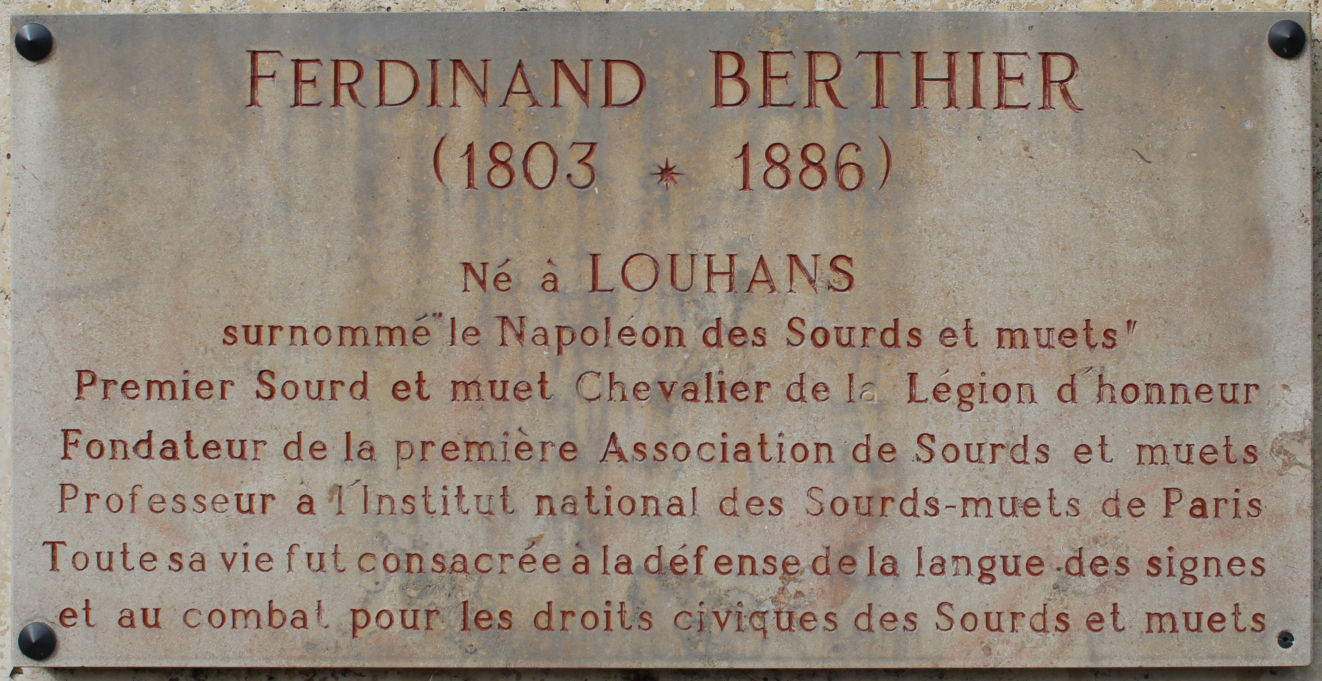 Buste de Ferdinand Berthier, Louhans.